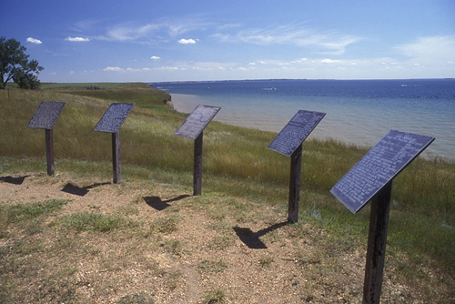 aj0444 north dakota interpretive signs at fort stevenson state park on lake sakakawea in garrison